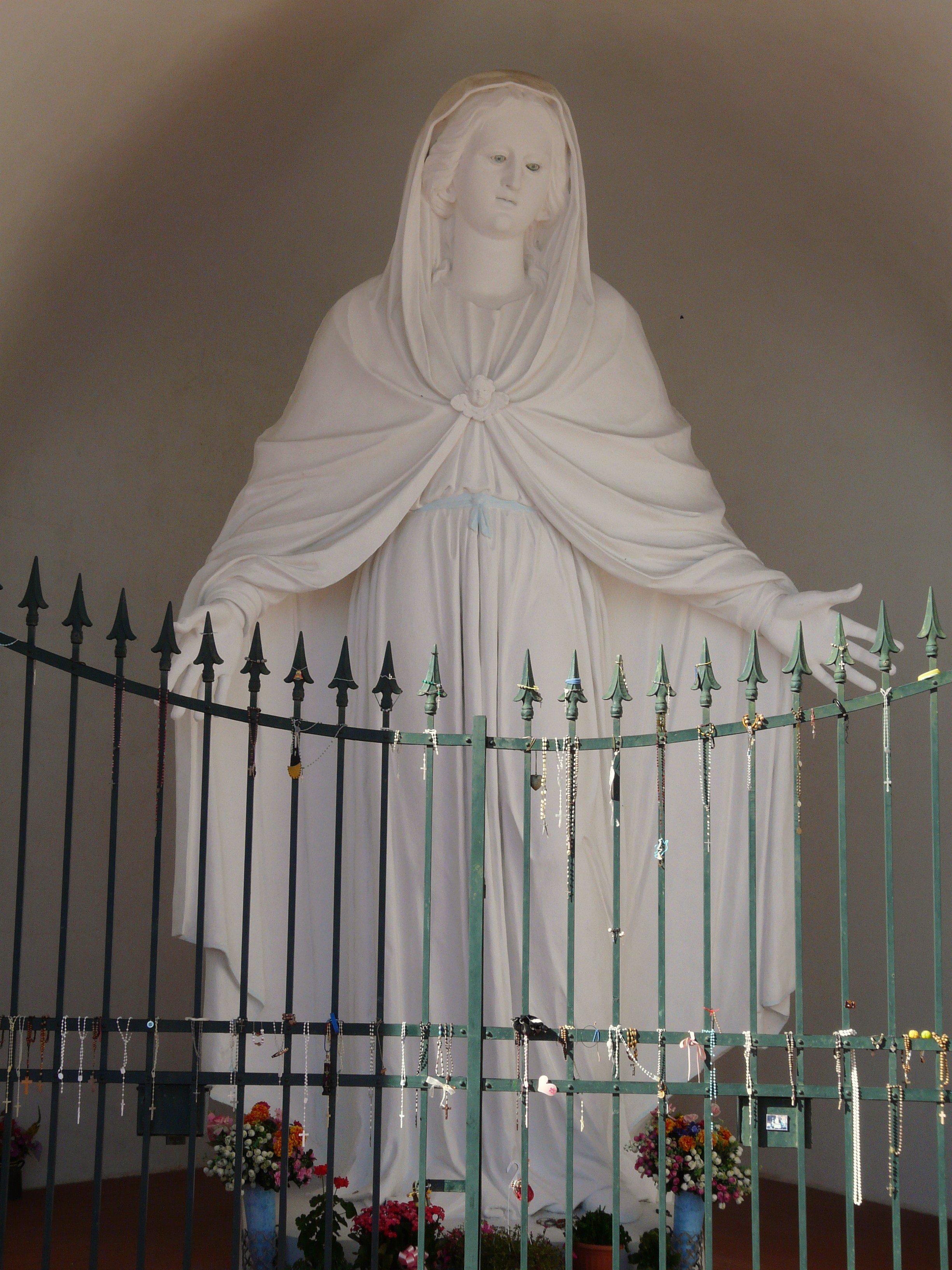 Statua della Madonna dello scultore Antonio Brilla del santuario di Nostra Signora del Gazzo, Monte Gazzo, Genova, Liguria, Italia